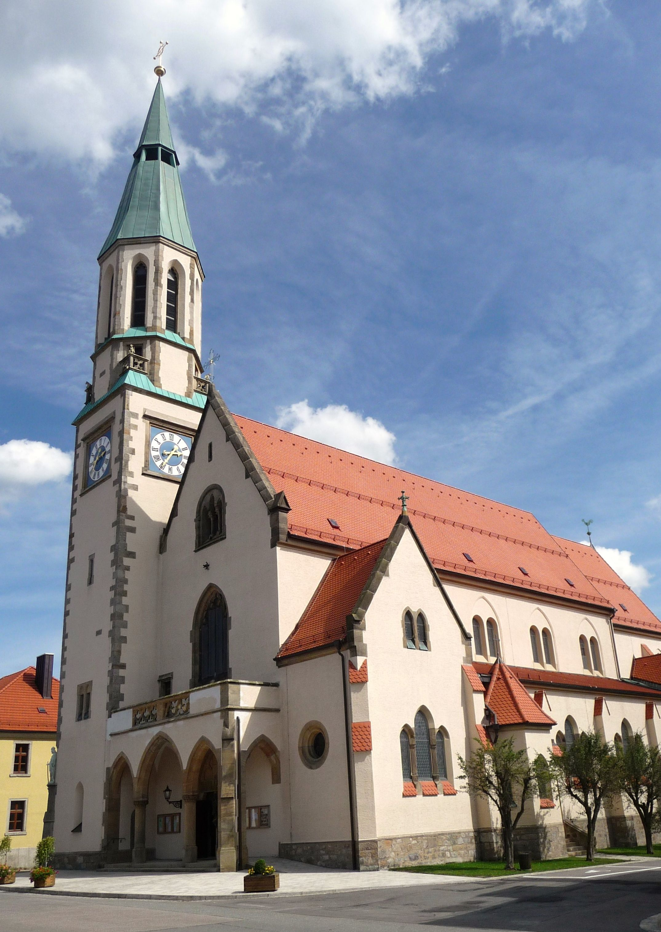 Die katholische Pfarrkirche St. Sigismund in Pleystein